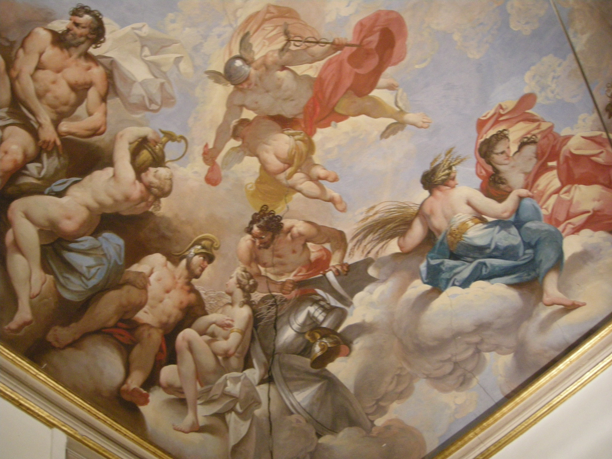 Gian Domenico Ferretti, sala dell'olimpo